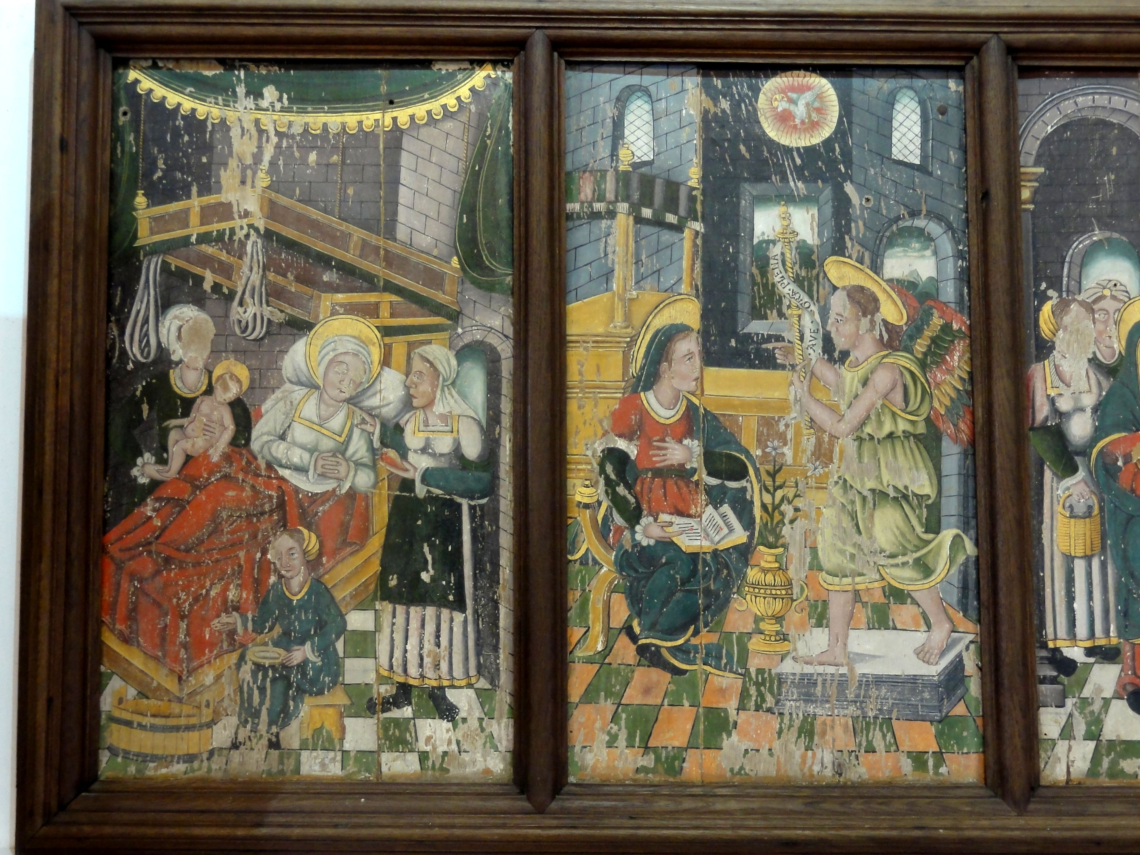 Retable - scènes de la vie de la Vierge, Naissance et Annonciation.